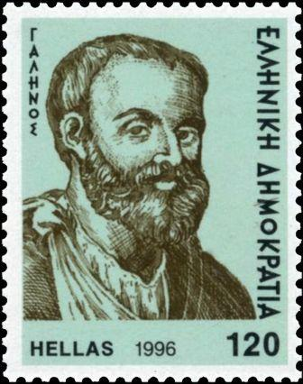 Гален на почтовой марке Греции 1996 года